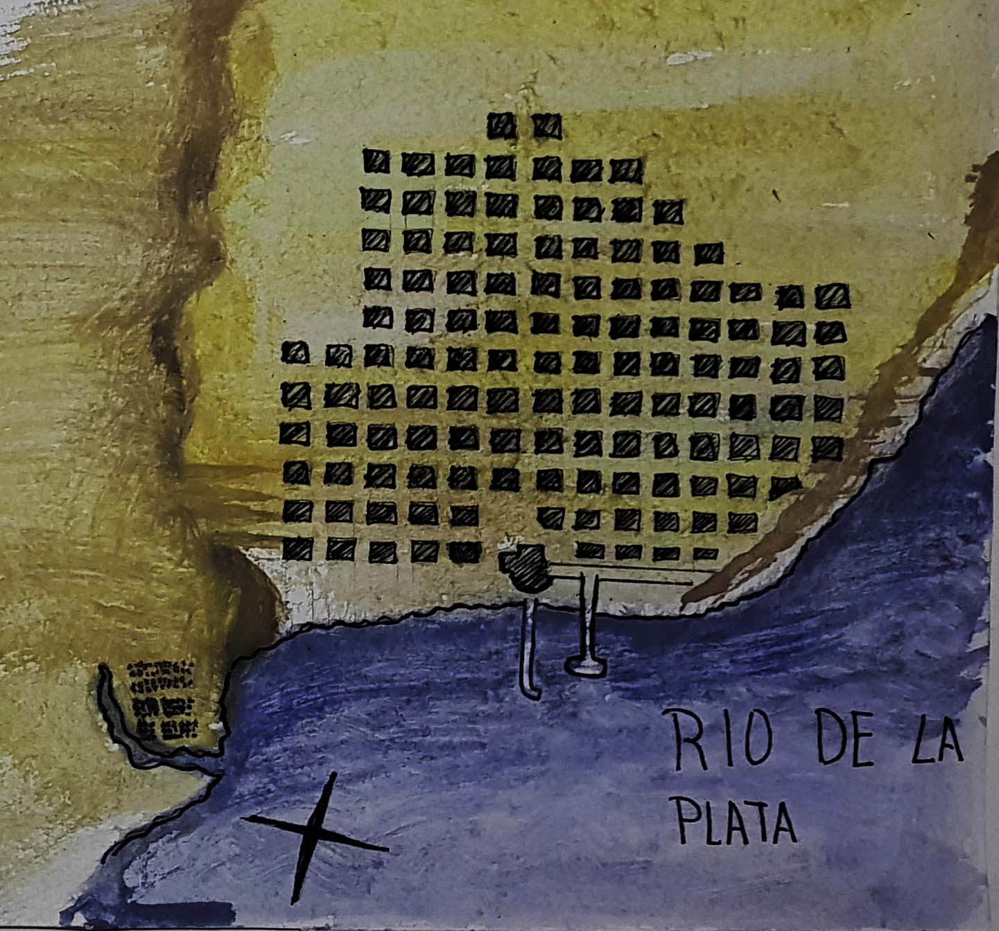 vista del casco historico del puerto de buenos aire.jpg